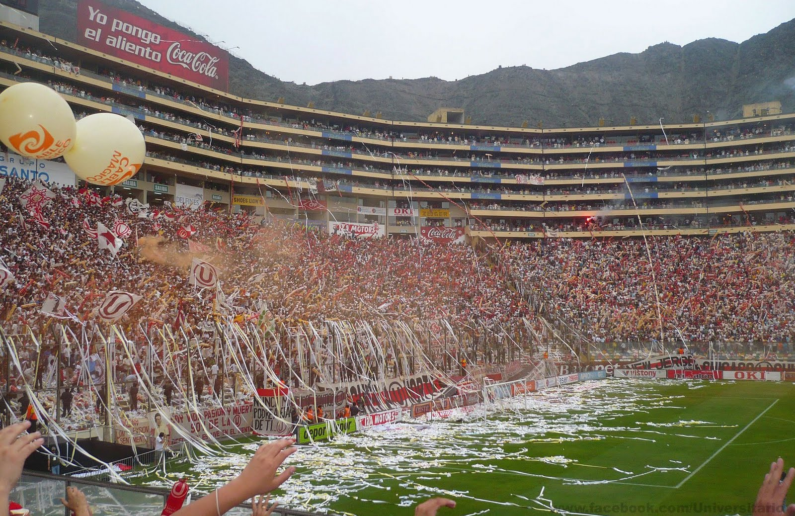 La ´´Trinchera Norte´´ de Universitario